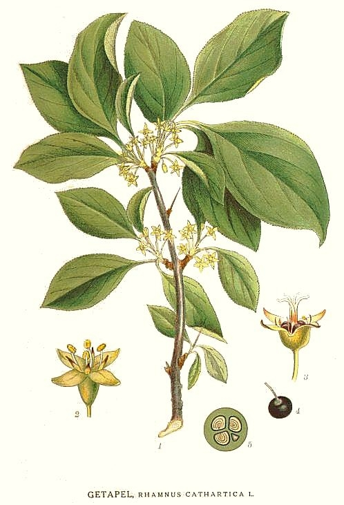 Rhamnus cathartica L. Original Description Getapel, Rhamnus cathartica L.